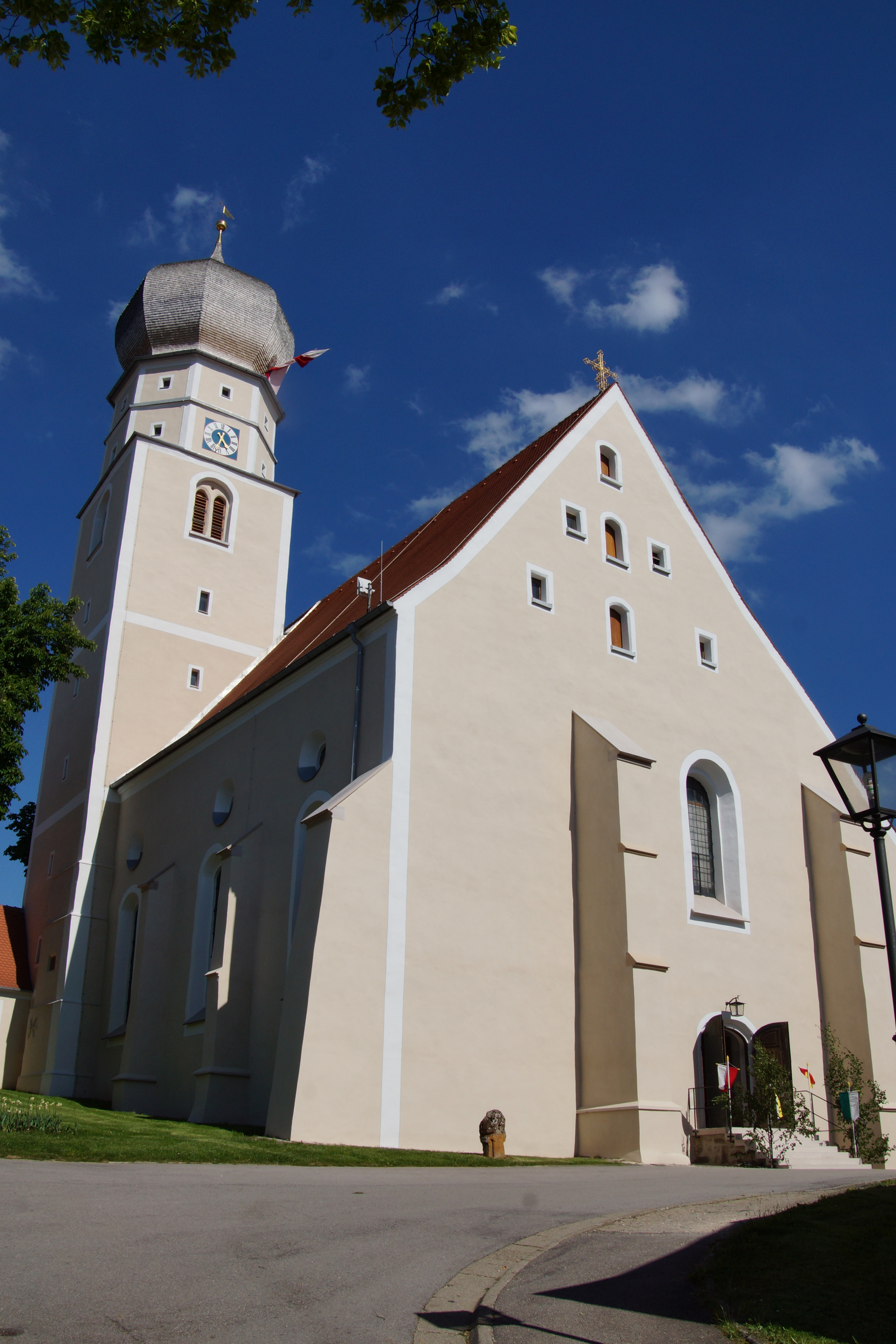 Die Pfarrkirche St. Johann Baptist in der Oberpfälzer Kleinstadt Velburg